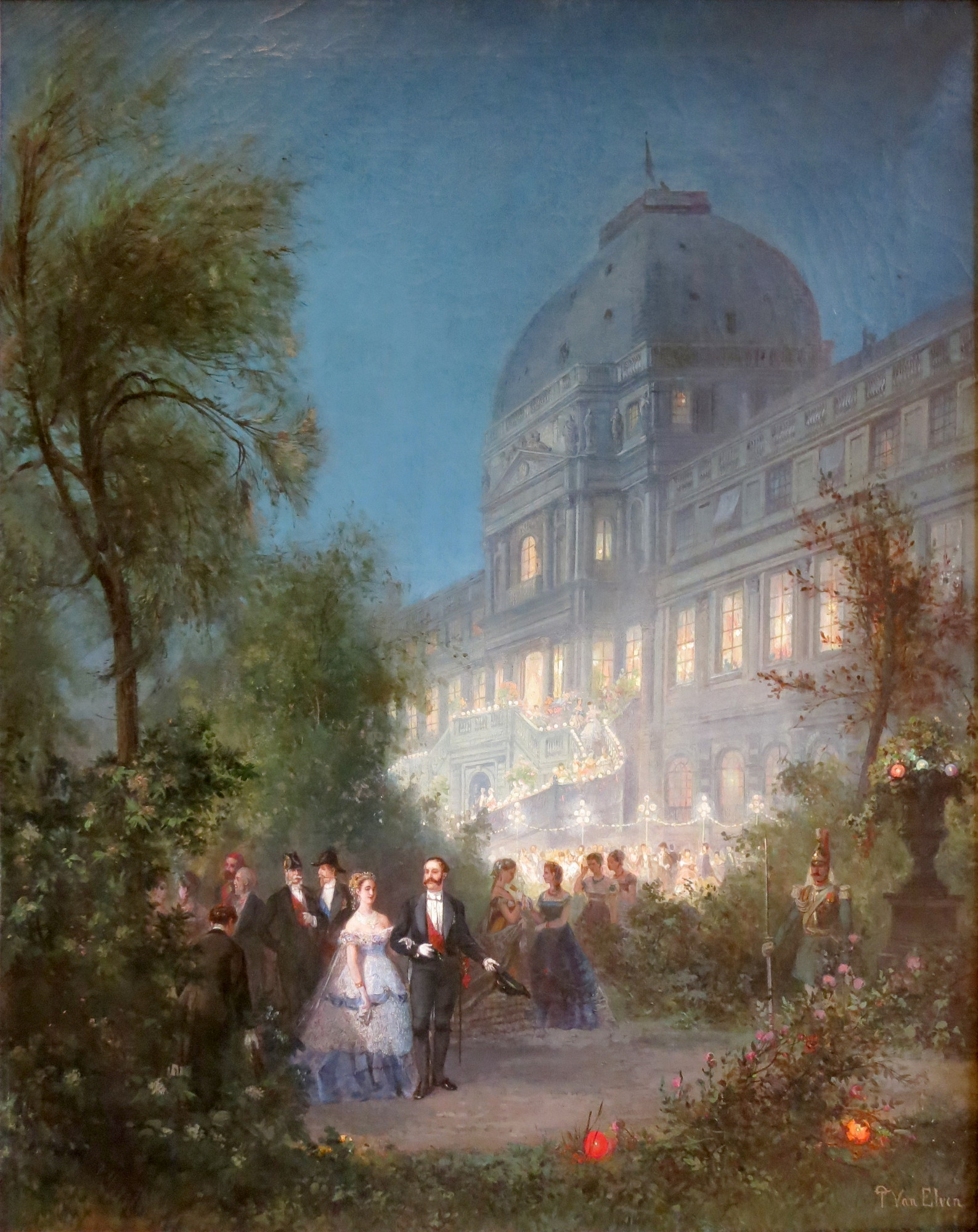 fête donnée à l'occasion de la visite des souverains étrangers pour l'exposition de 1867, le Tsar Alexandre II au bras de l'impératrice Eugénie et Napoléon III avec Guillaume Ier de Prusse et le sultan Abdulaziz)